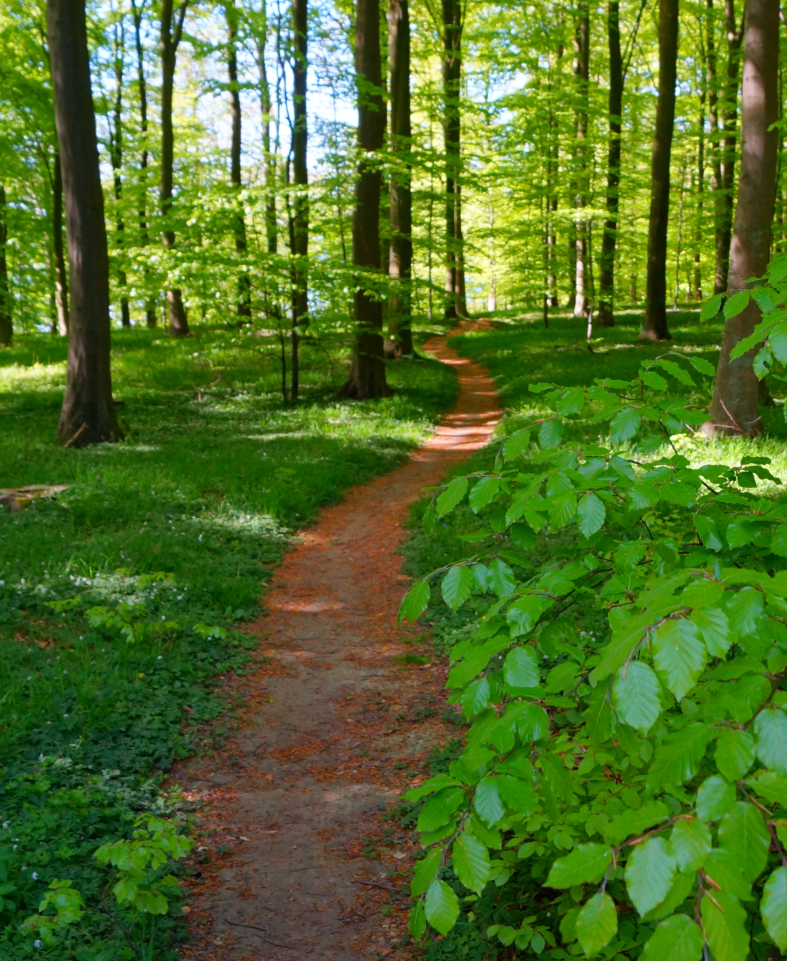 Thyras Hytte, Hestehave Skov